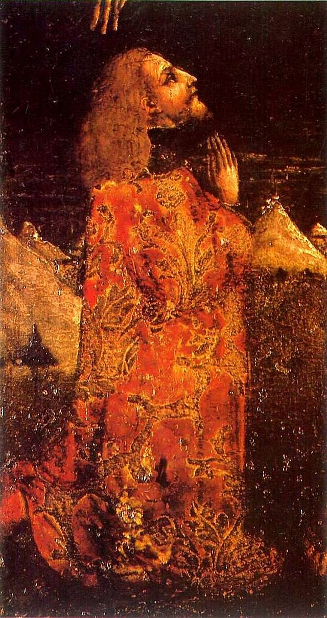 "Стјепан Томашевић, посљедњи краљ босански, клечи пред Спаситељем", 1461 ("Повјест Хрвата од најстаријих времена до свршетка XIX стољећа", 37) Autor: Jacopo Bellini, 1461. ("Gotico in Slovenia", 56). "Donator i Krist", portrait of King Stjepan Tomašević, 1461 Authorship: Lovro Dobričević, 1461. (mnogi ovo djelo pripisuju Jacopu Belliniju što je netačno). Technique: distemper and gilding on board. Donor: Josip Juraj Strossmayer, 1883. (Na poleđini je bila nalijepljena povelja s prikazom genealoškog stabla bosanskih i srpskih kraljeva te grbovima ilirskih zemalja s nadodanim grbom obitelji Ohmučević.)